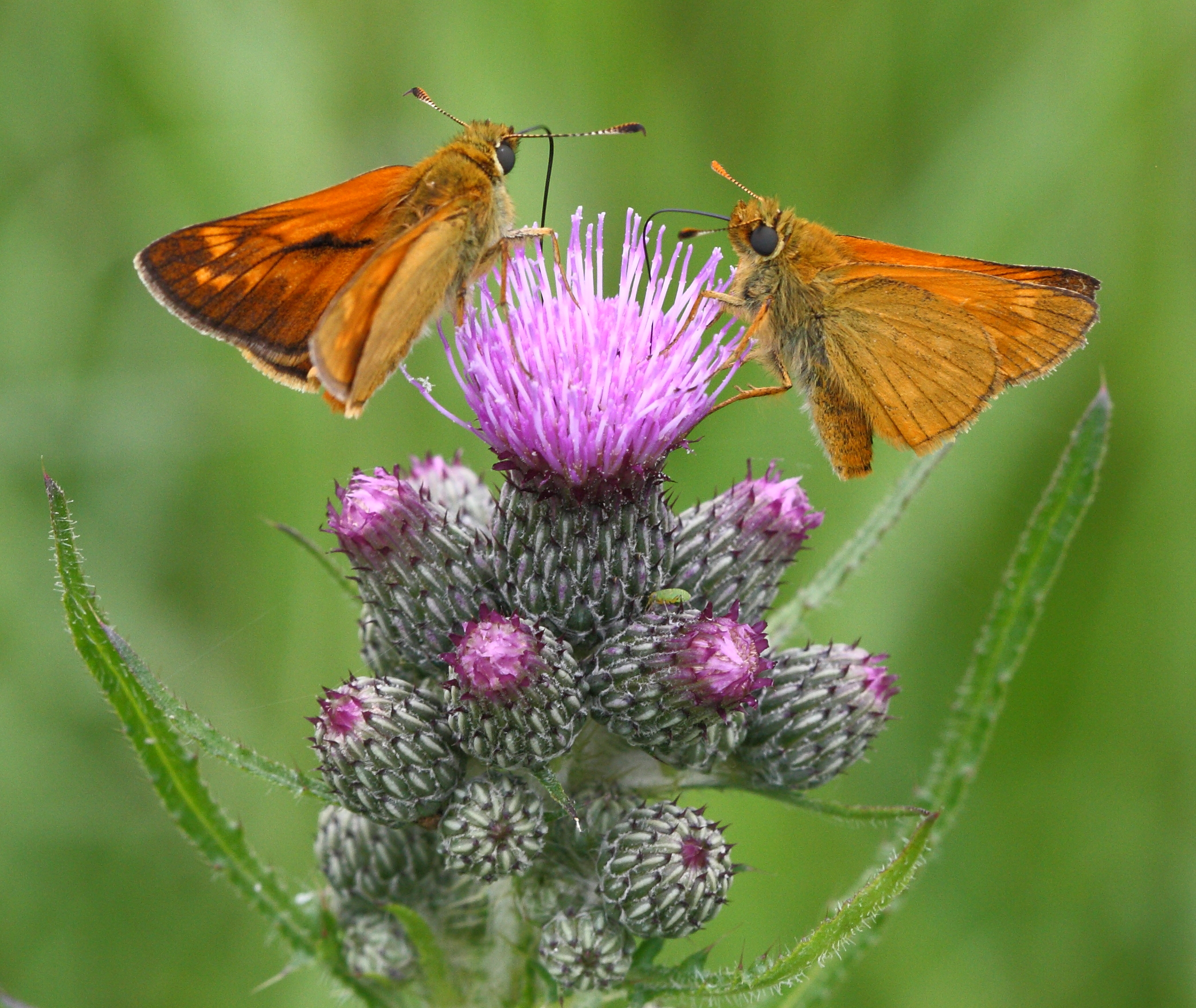 Sachsen, Feuchtwiese (350 m ü.M.): Rostfarbiger_Dickkopffalter_(Ochlodes_sylvanus)